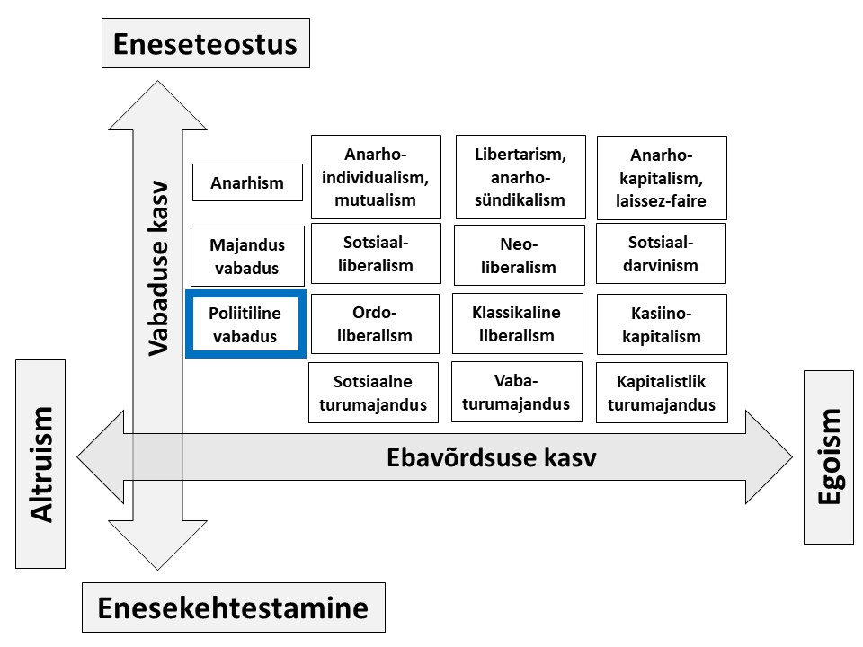 Poliitiline vabadus sotsiaalse korra mudelis